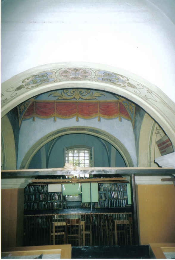 פנים בית הכנסת בסטז'יז'וב. בראשית המאה ה-21 שימש המקום כספריה